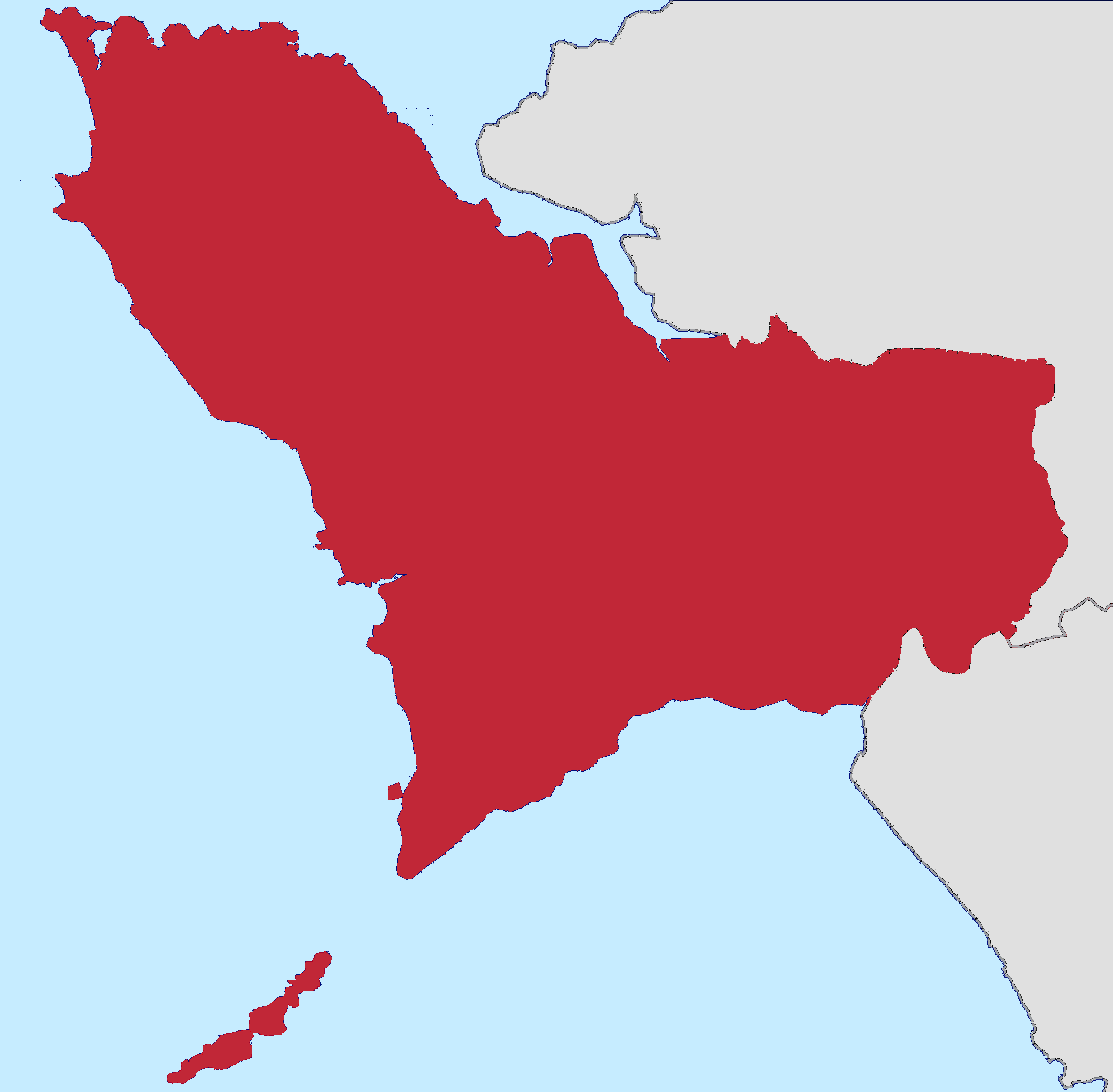 Karte der Western Area (Sierra Leone)